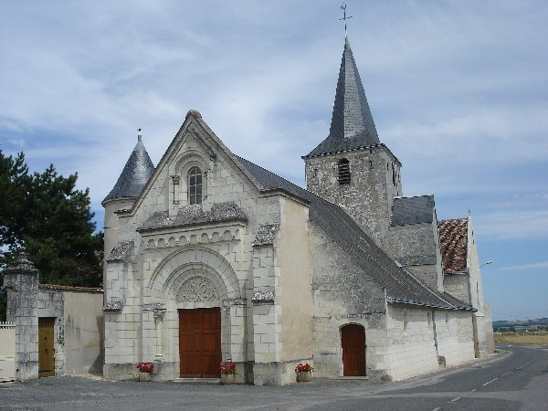 Eglise de Courcoué photo prise par Bernard Montero